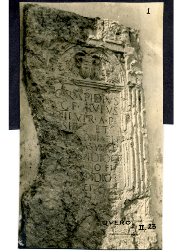 Foto scattate durante la spedizione, guidata da Alessio De Bon e promossa dall'Istituto Veneto di Scienze, Lettere ed Arti, per l'individuazione del tracciato originale della via Claudia Augusta Altinate. Foto scattata presso Quero (BL), tra il 1935-1938. La foto è attualmente depositata all'Istituto Veneto di Scienze, Lettere ed Arti